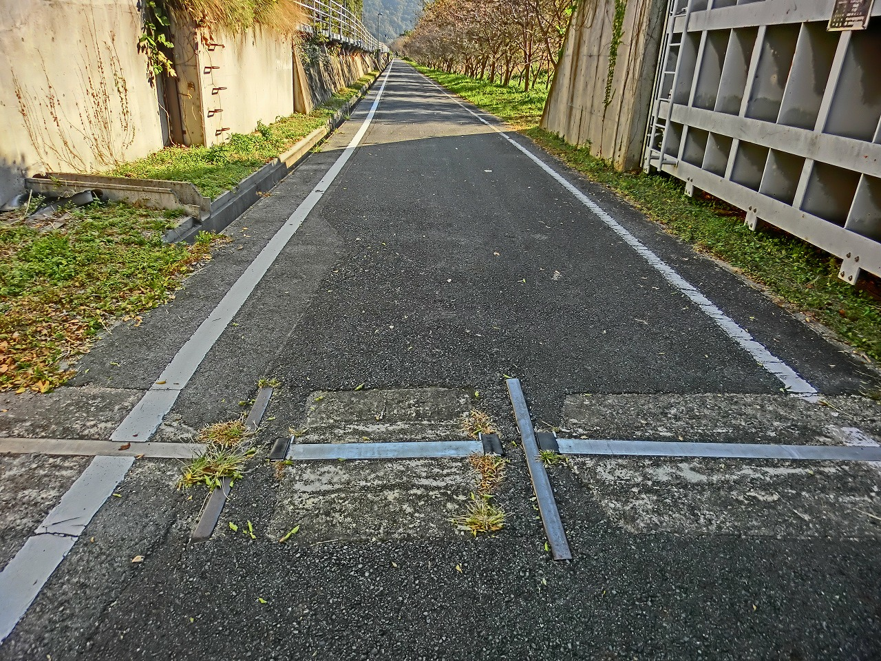 吉井川の陸閘門 岡山県道703号備前柵原自転車道線 旧同和鉱業片上鉄道 岡山県